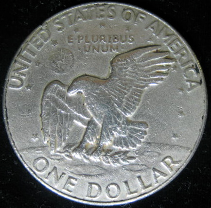 Eisenhower Dollar - 1978 - rovescio - Disegnatore:Frank Gasparro - Diametro mm.38,1 Zecche di Denver - San Francisco. Collezione privata - fotografia personale